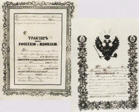 Сімодський трактат. Титульна сторінка російсько-японського договору 1855 р.